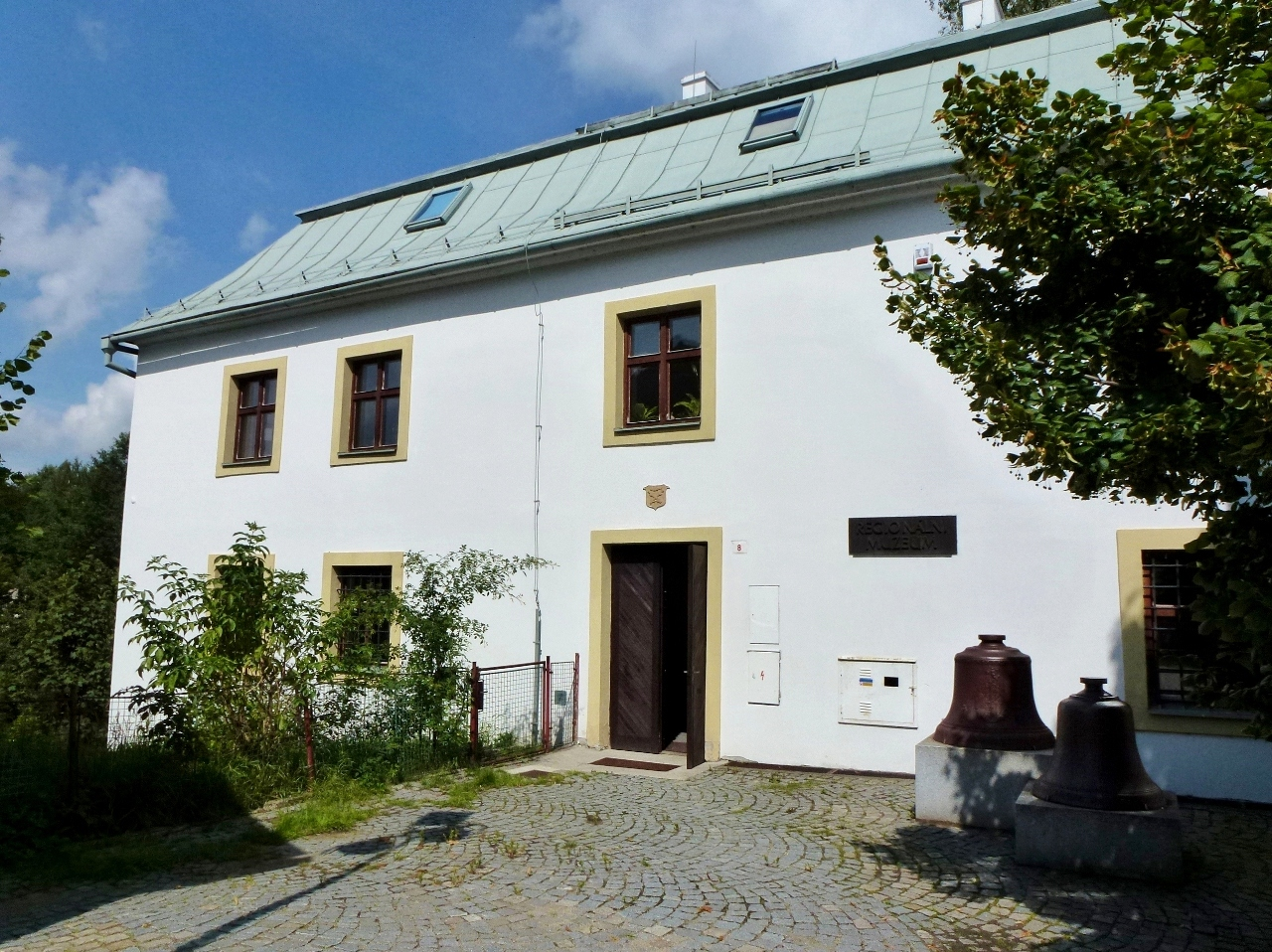 Tvrz čp. 276, Tvrz 276, Žďár nad Sázavou